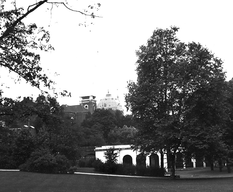 Der neu angelegte Kurpark in Burtscheid mit den Resten der Wandelhalle von Friedrich Joseph Ark, Zustand 1956